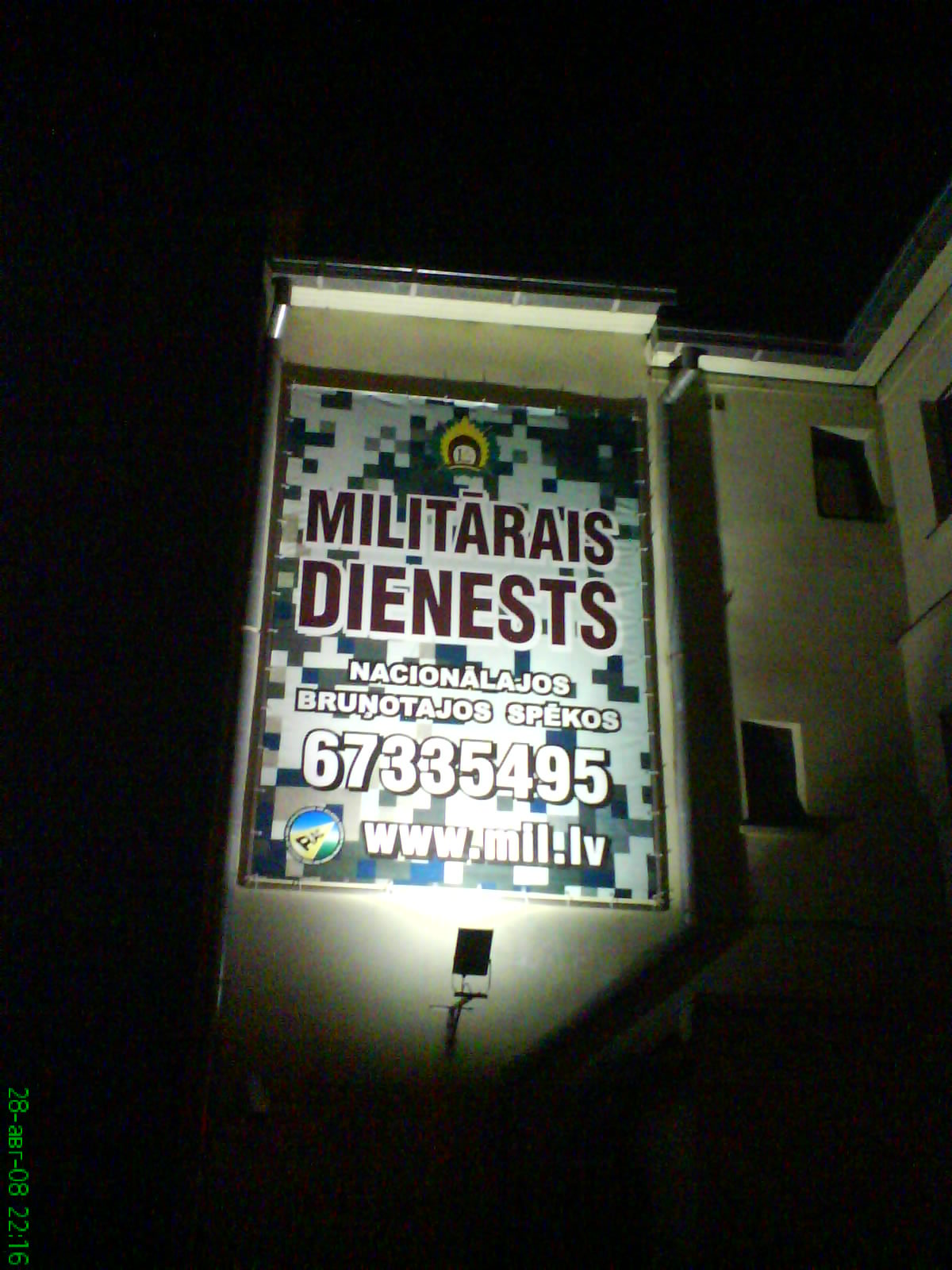 Плакат, призывающий поступать на службу в Латвийские Вооруженные Силы